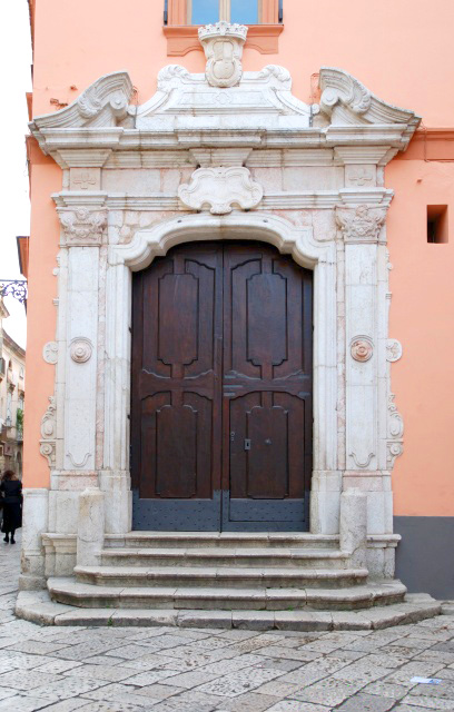 Il portone di Palazzo San Francesco, attualmente sede comunale di Sant'Agata de' Goti (BN), Italia